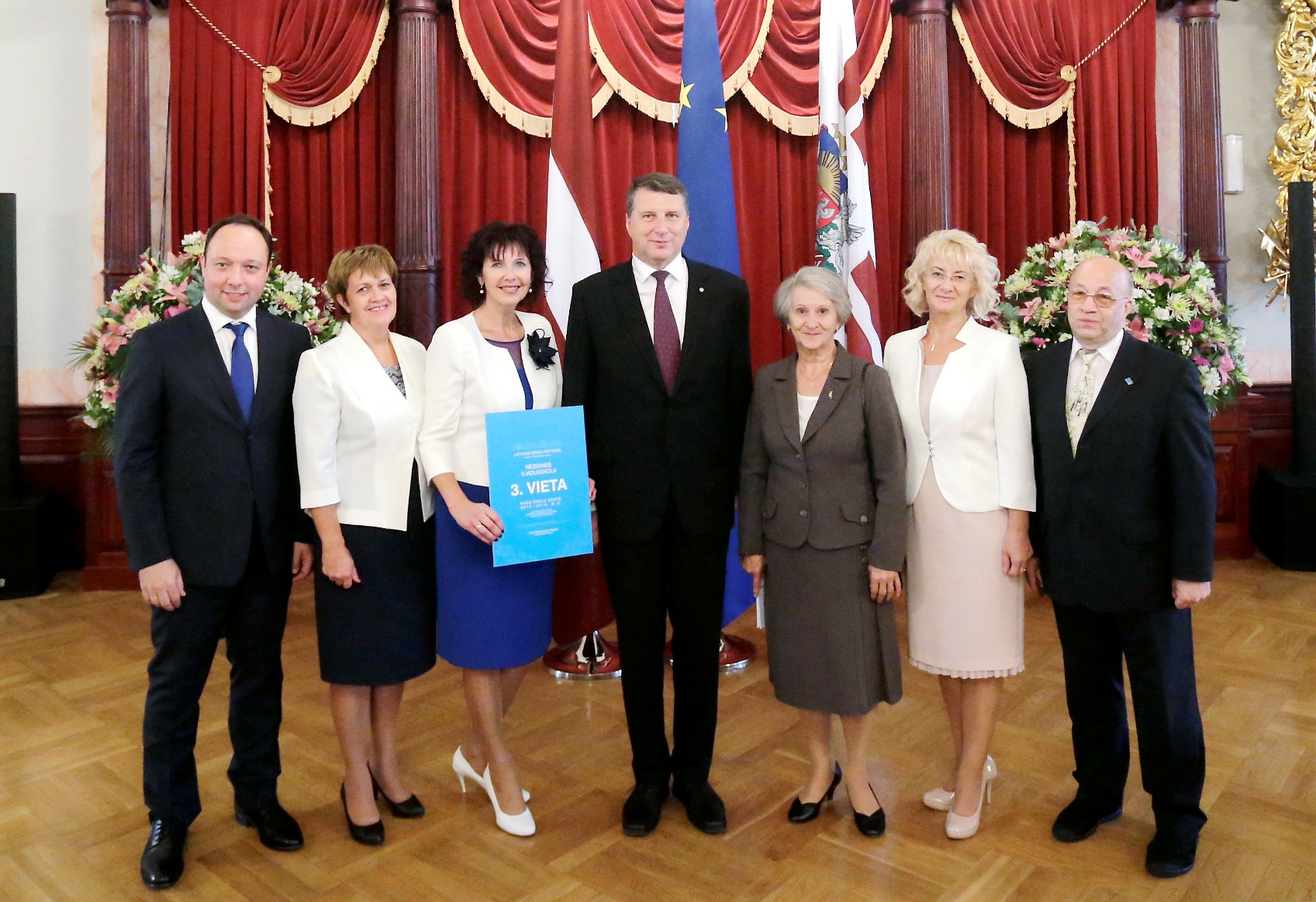 Rēzeknes 5. vidusskolas pedagogi pie prezidenta 2016. gadā